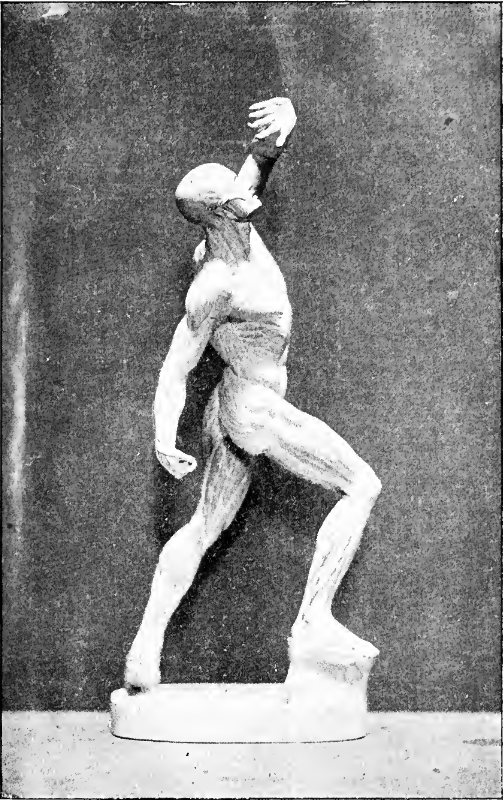 écorché, sculpture réalisée par Jacques-Eugène Caudron, à la demande du docteur Antoine-Louis-Julien Fau